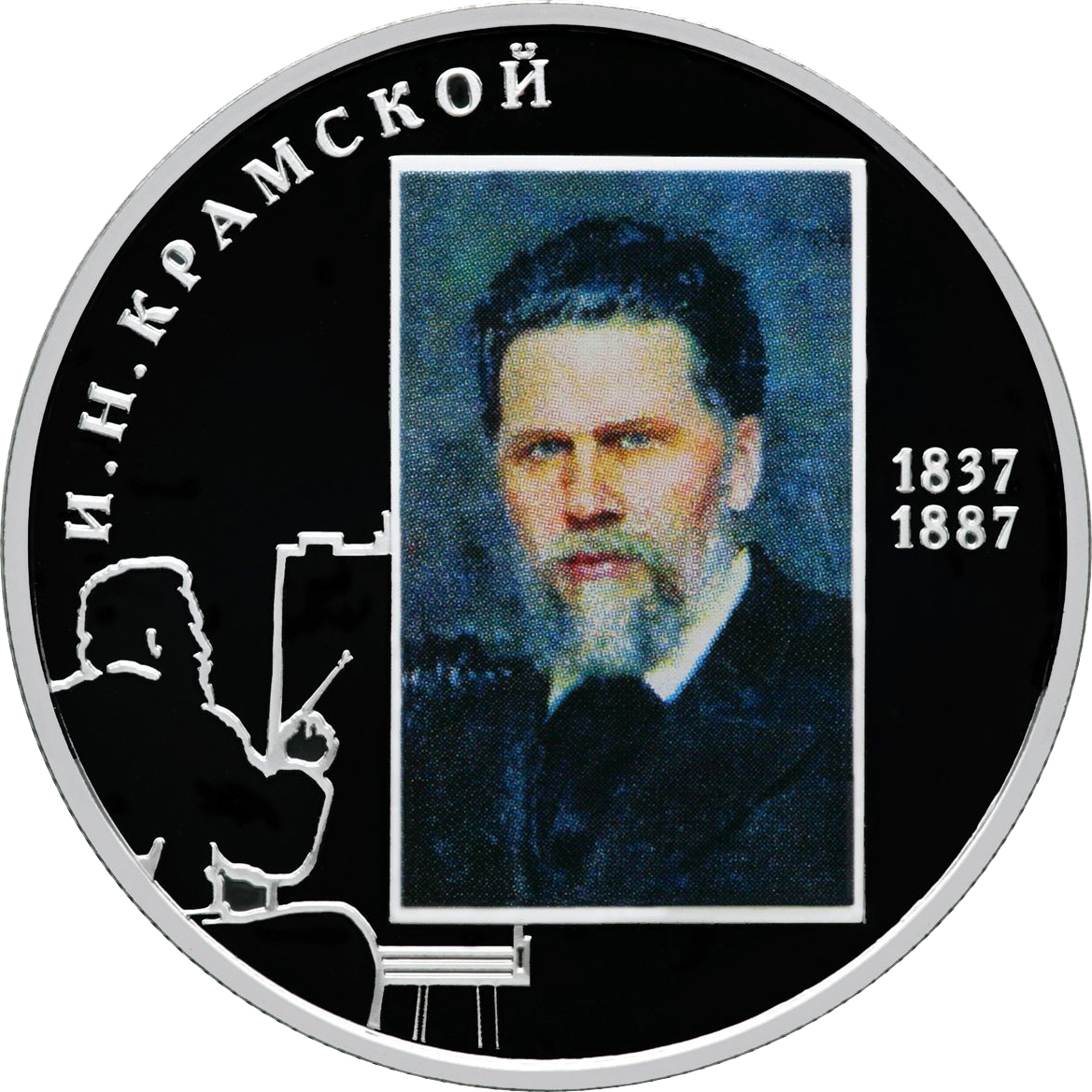 Реверс монеты "Выдающиеся личности России: Художник И.Н. Крамской, к 175-летию со дня рождения (08.06.1837)", 2 рубля, 2012, серебро.